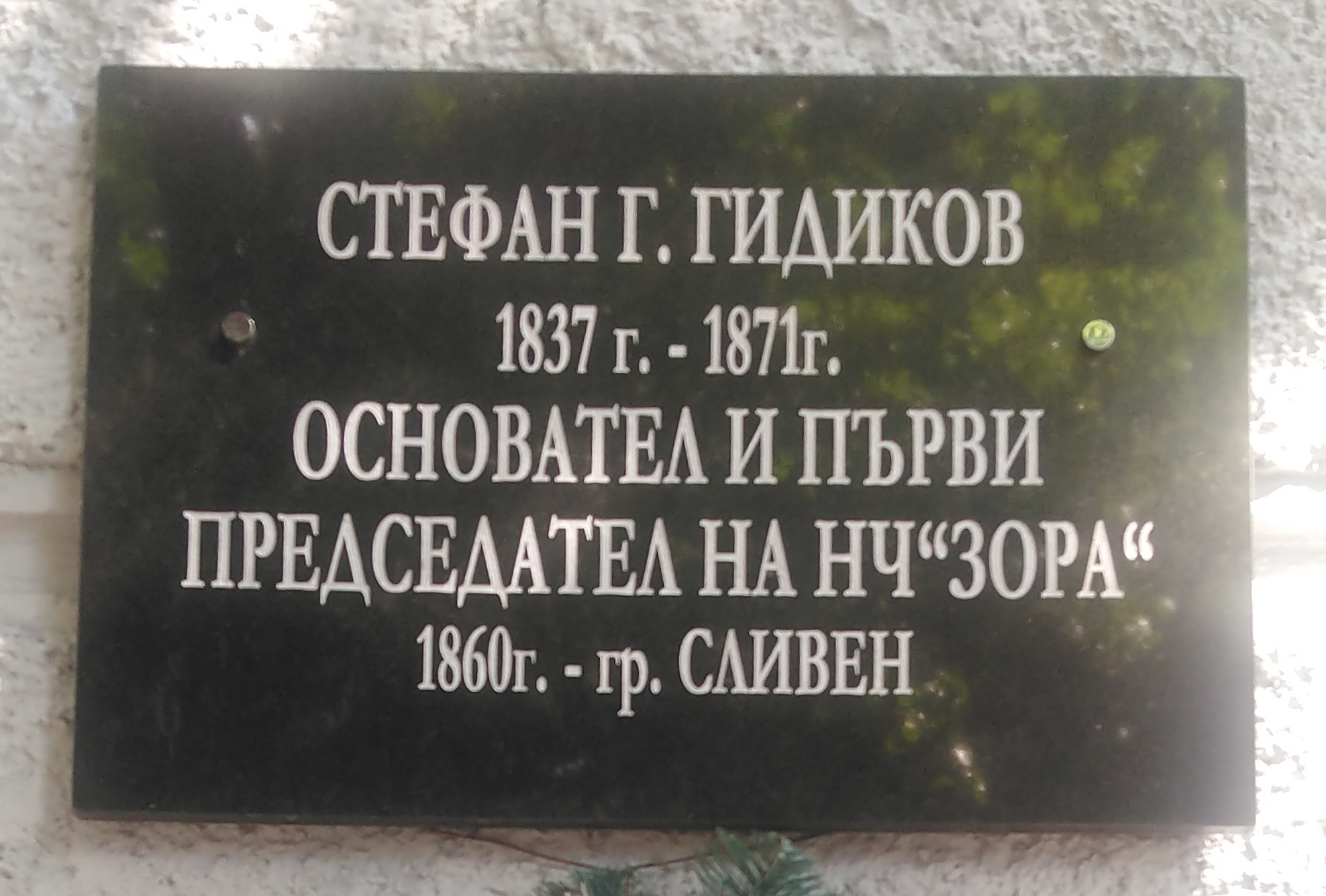 Паметна плоча на основателя и първи председател на читалище „Зора“, Сливен, Стефан Г. Гидиков